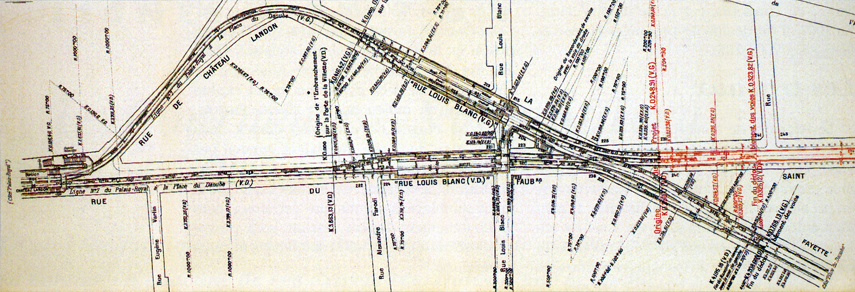 Plan du débranchement de la ligne 7 du métro de Paris à la station Louis Blanc, France